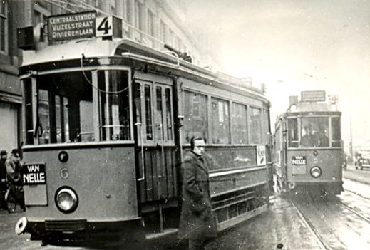 De Amsterdamse trams 2 en 6 op het Damrak in 1941. Wagen 6 was ontspoord en was naast de rails geplaatst. Dit zijn voormalige trams uit Utrecht. Vervaardiger onbekend. Gelet op artikel 38 van de Auteurswet 1912 en de nadere invulling daarvan zoals verduidelijkt onder punt 1.1.5.12 van de Juridische wegwijzer archieven en musea online en de discussie hier is het auteursrecht op deze afbeelding vervallen vanaf 1 januari 2012.